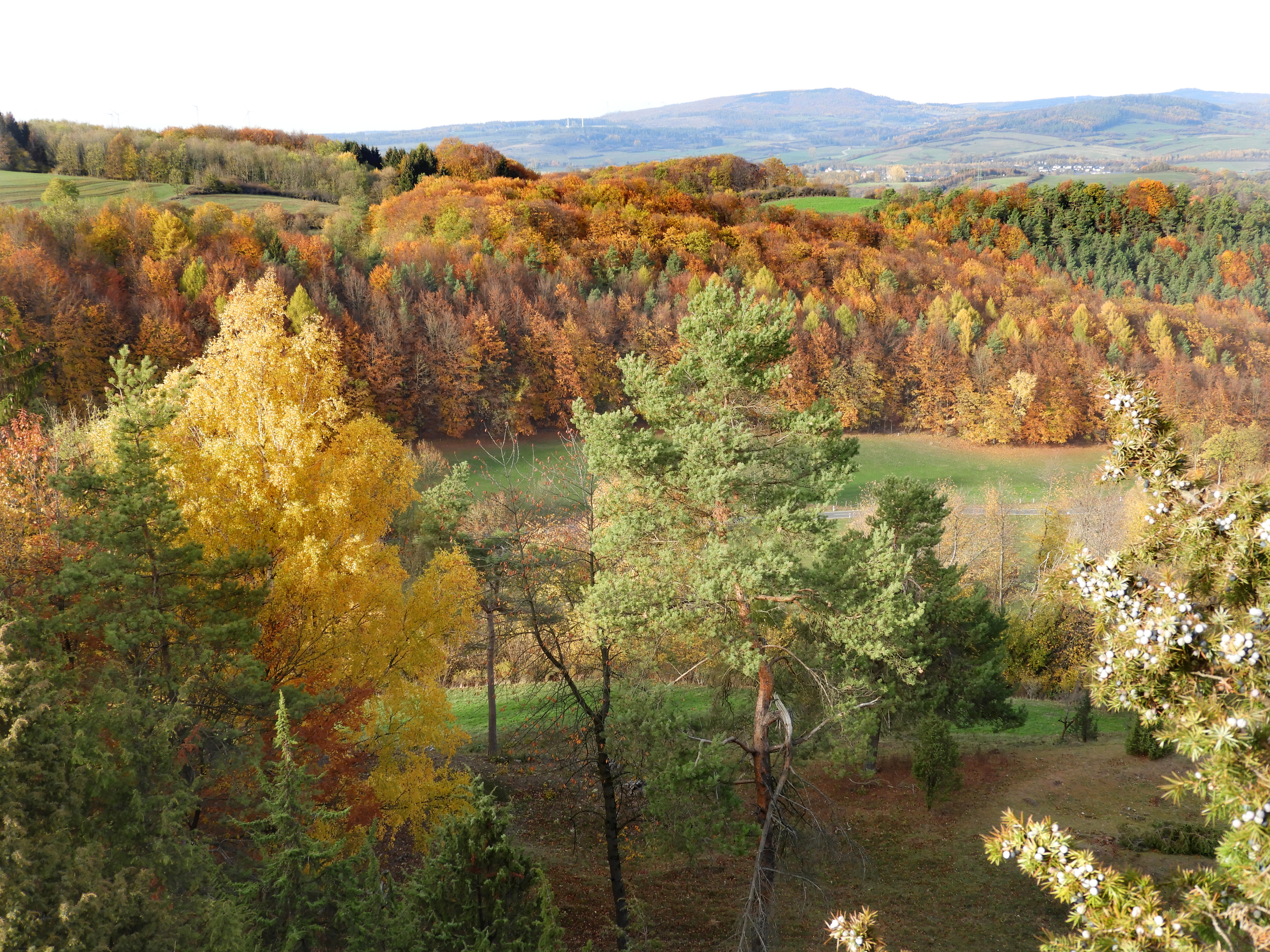 Die Reichenbacher Kalkberge sind ein strukturreiches Gebiet mit schützenswerten Biotopen im nordhessischen Werra-Meißner-Kreis. Wegen ihrer Artenvielfalt wurden die Reichenbacher Kalkberge zum Naturschutzgebiet erklärt und als gleichnamiges Fauna-Flora-Habitat-Gebiet mit der Nr. 4824-301 Teil des europäischen Schutzgebietsnetzes Natura 2000. Innerhalb des Schutzgebiets wurde ein Naturwaldreservat im Bereich der Ruine Reichenbach ausgewiesen.